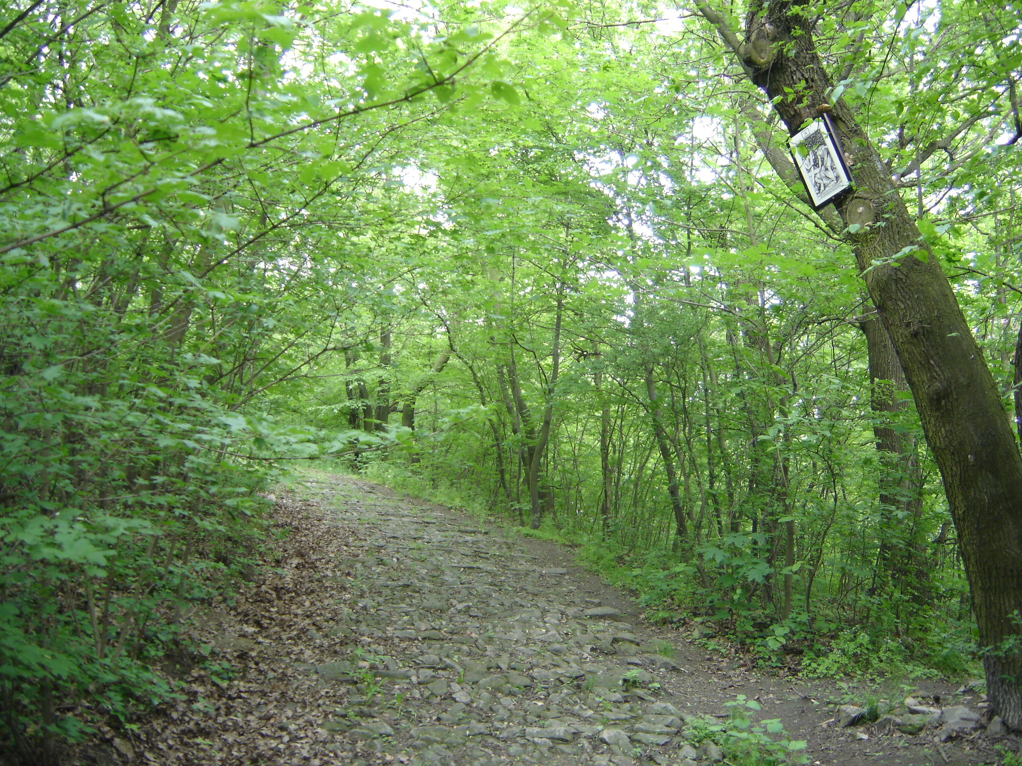 Bratislavská Kalvária